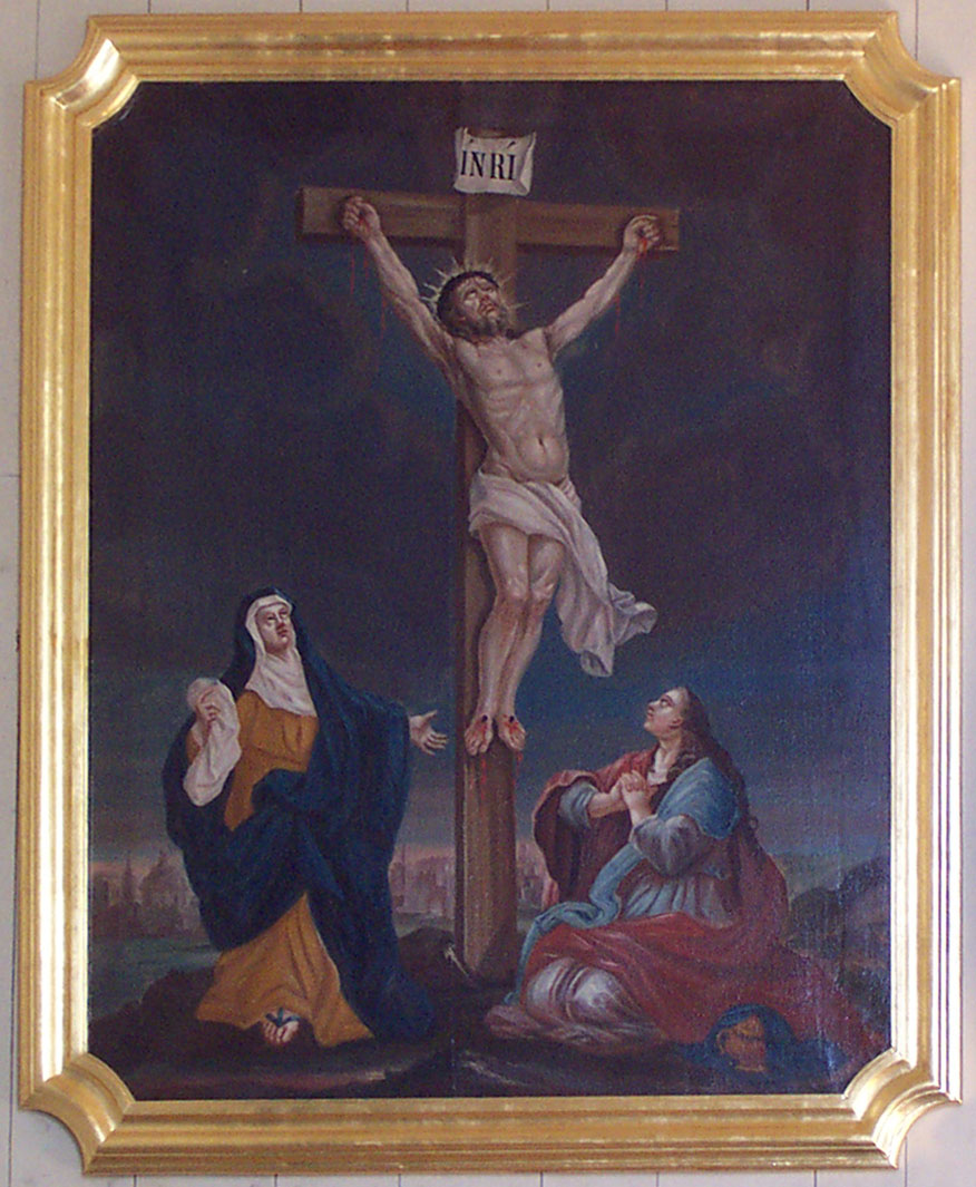 Gamla altartavlan i Säfsnäs kyrka av Daniel Hjulström 1766